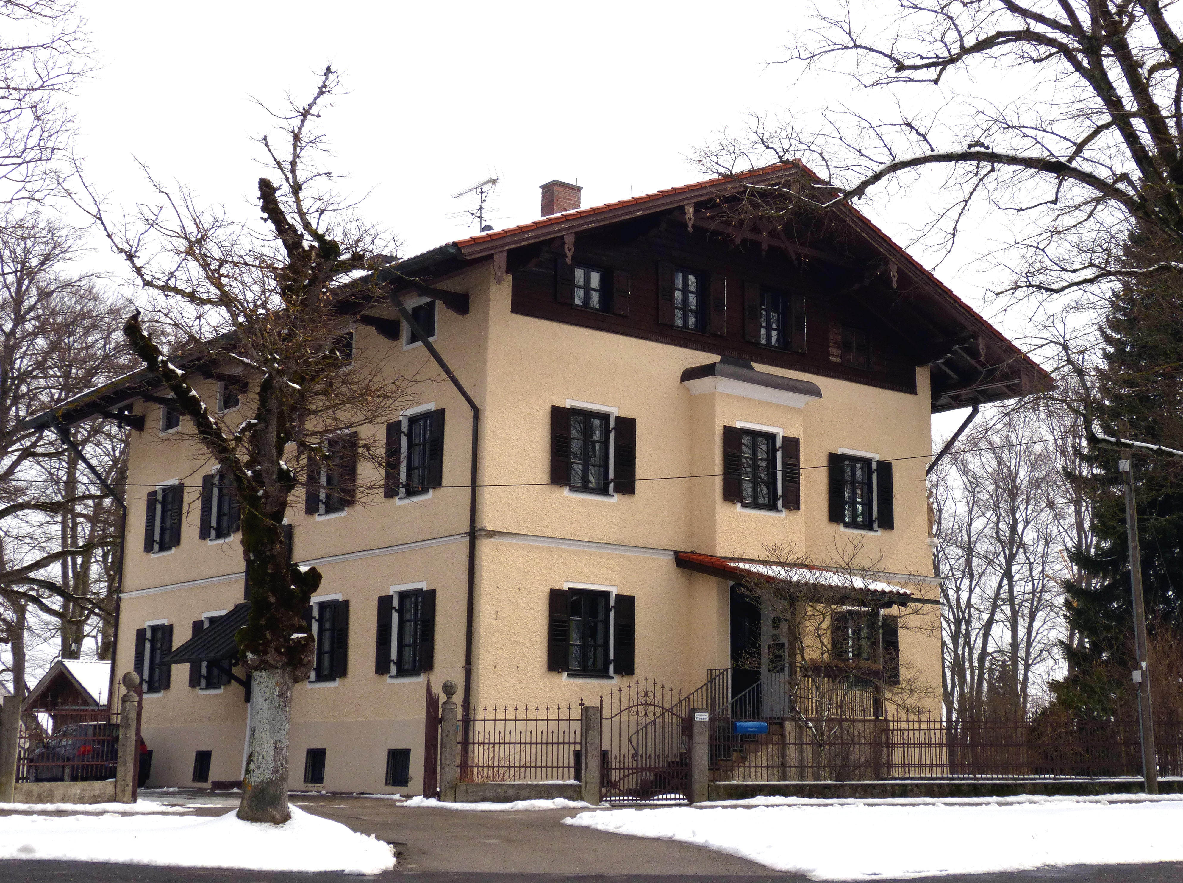 Berg am Starnberger See, OT Aufkirchen, Lindenallee 2, Pfarrhaus. Der zweieinhalbgeschossige Flachsatteldach mit weitem Dachüberstand und Flacherkern im Landhausstil wurde in den Jahren 1899/1900 erbaut. This is a photograph of an architectural monument.